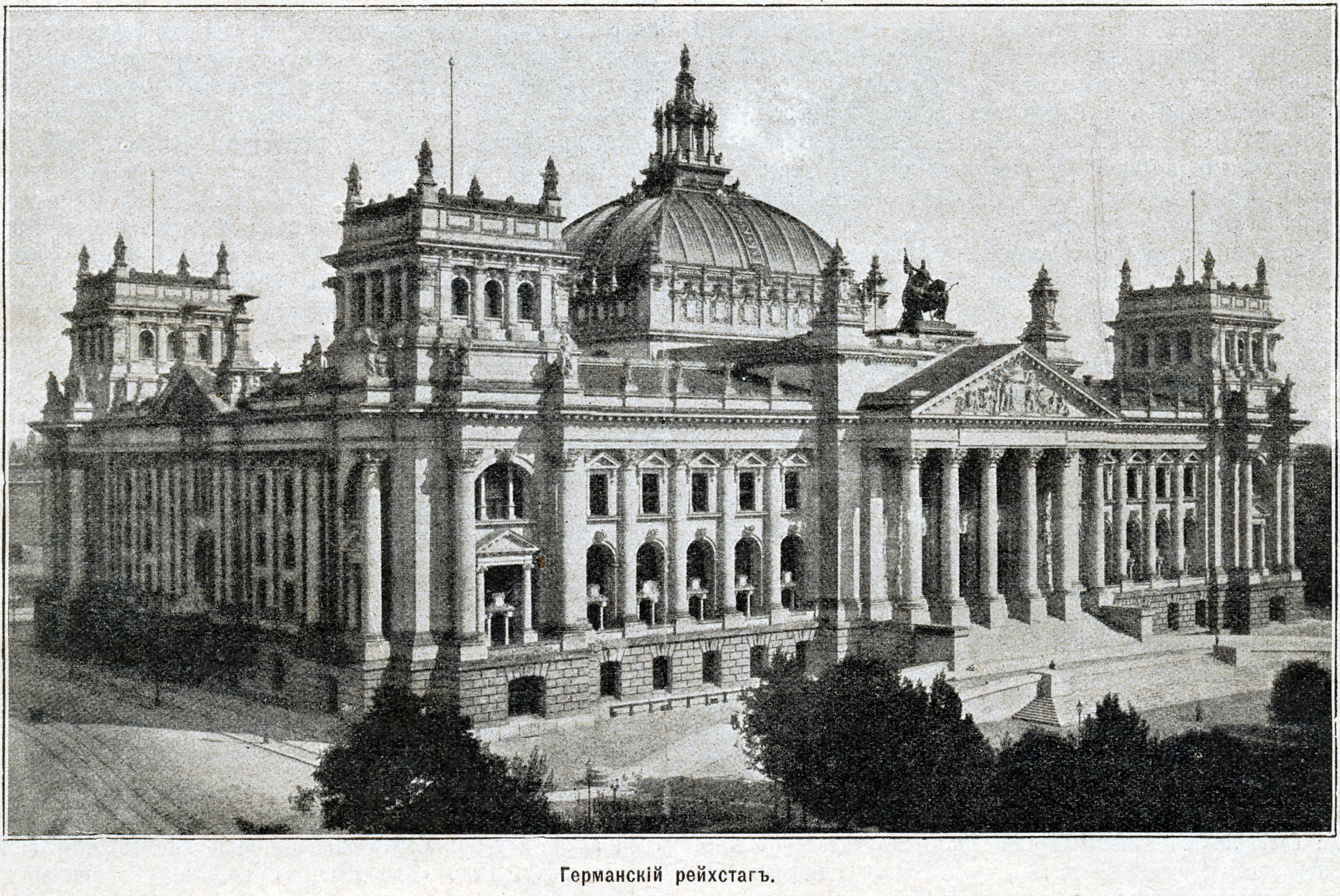 Рейхстаг, фото конца XIX века.